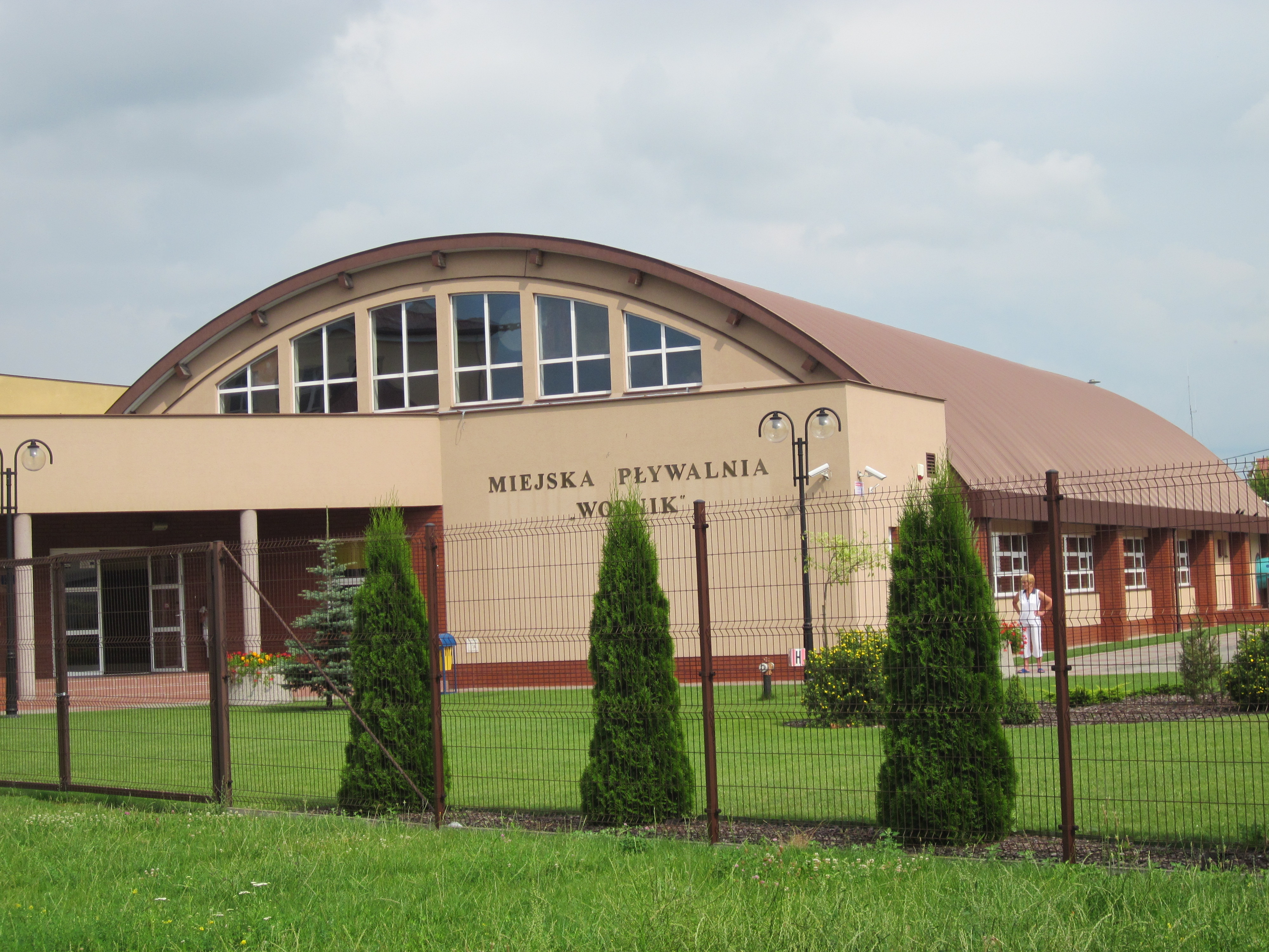 Pływalnia znajduje się przy ul. Szpitalnej 1. Oddana do użytku 7 września 2006 r. Uroczyste otwarcie i poświęcenie krytej pływalni nastąpiło w sobotę 21 października 2006 roku.